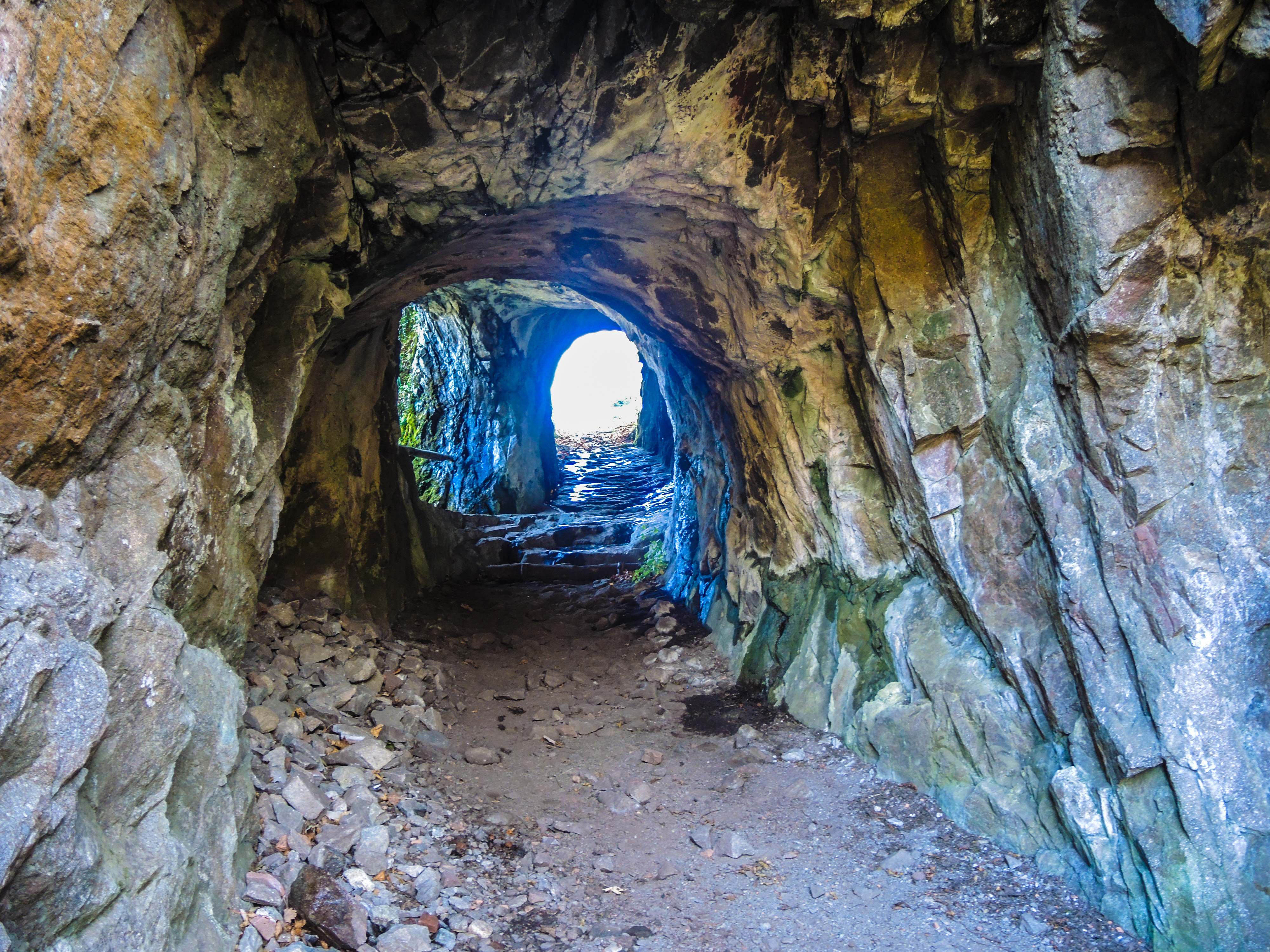 Schlossberg. Tunnel d'entrée dans le château. Kruth. Haut-Rhin.